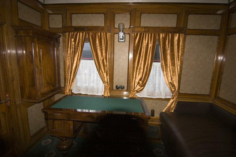 Вагон-салон № 70006 в експозиції Київської виставки рухомого складу історичних локомотивів та вагонів. Інтер'єр кабінету